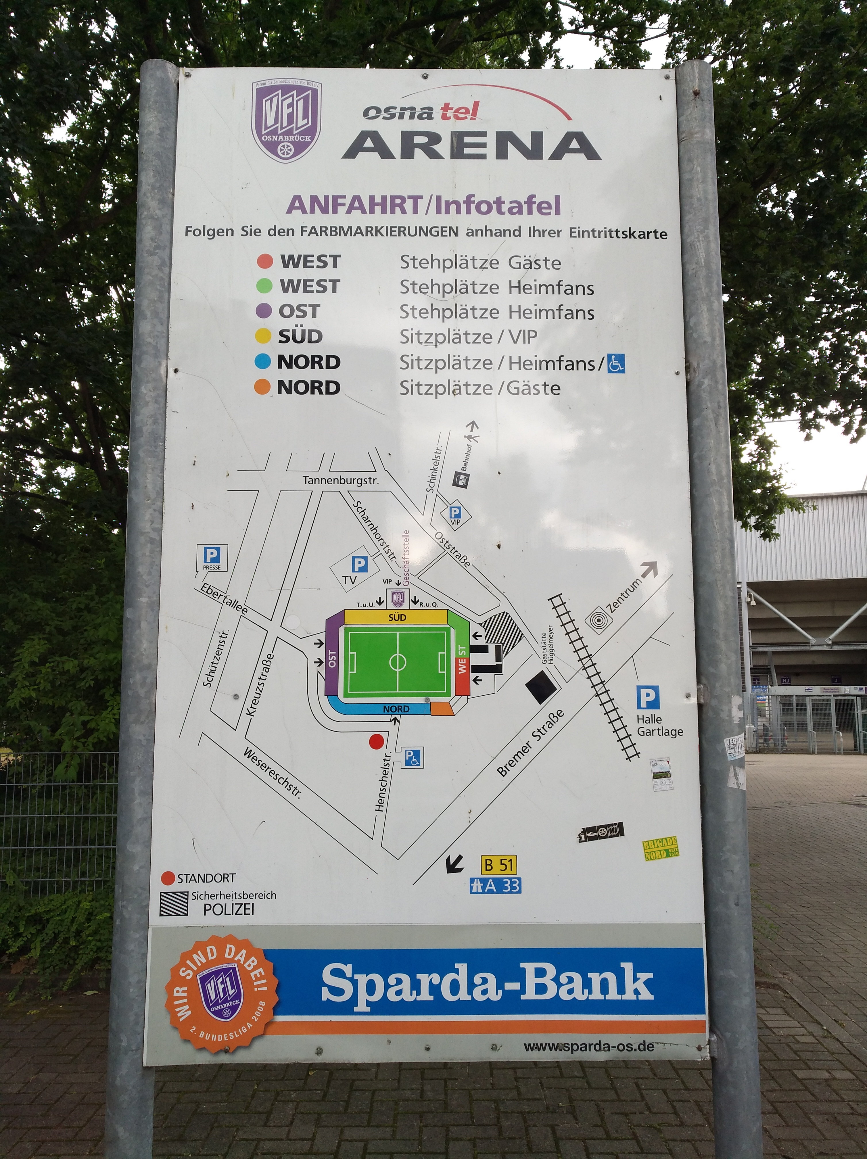 Eine Infotafel mit Lageplan des Stadions an der Bremer Brücke an der Henschelstraße in Osnabrück.